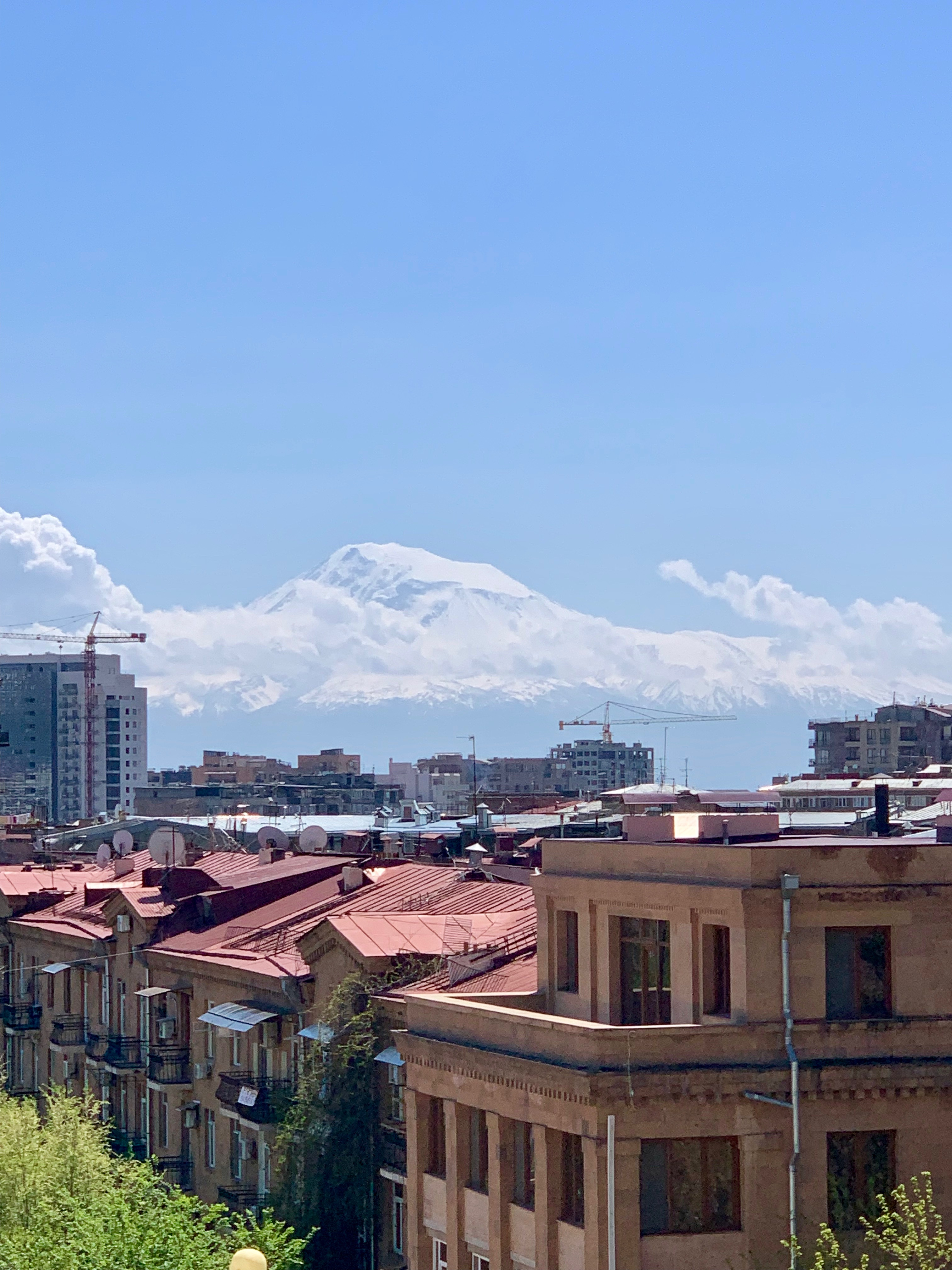 Вид на горы Армении с вершины Каскада